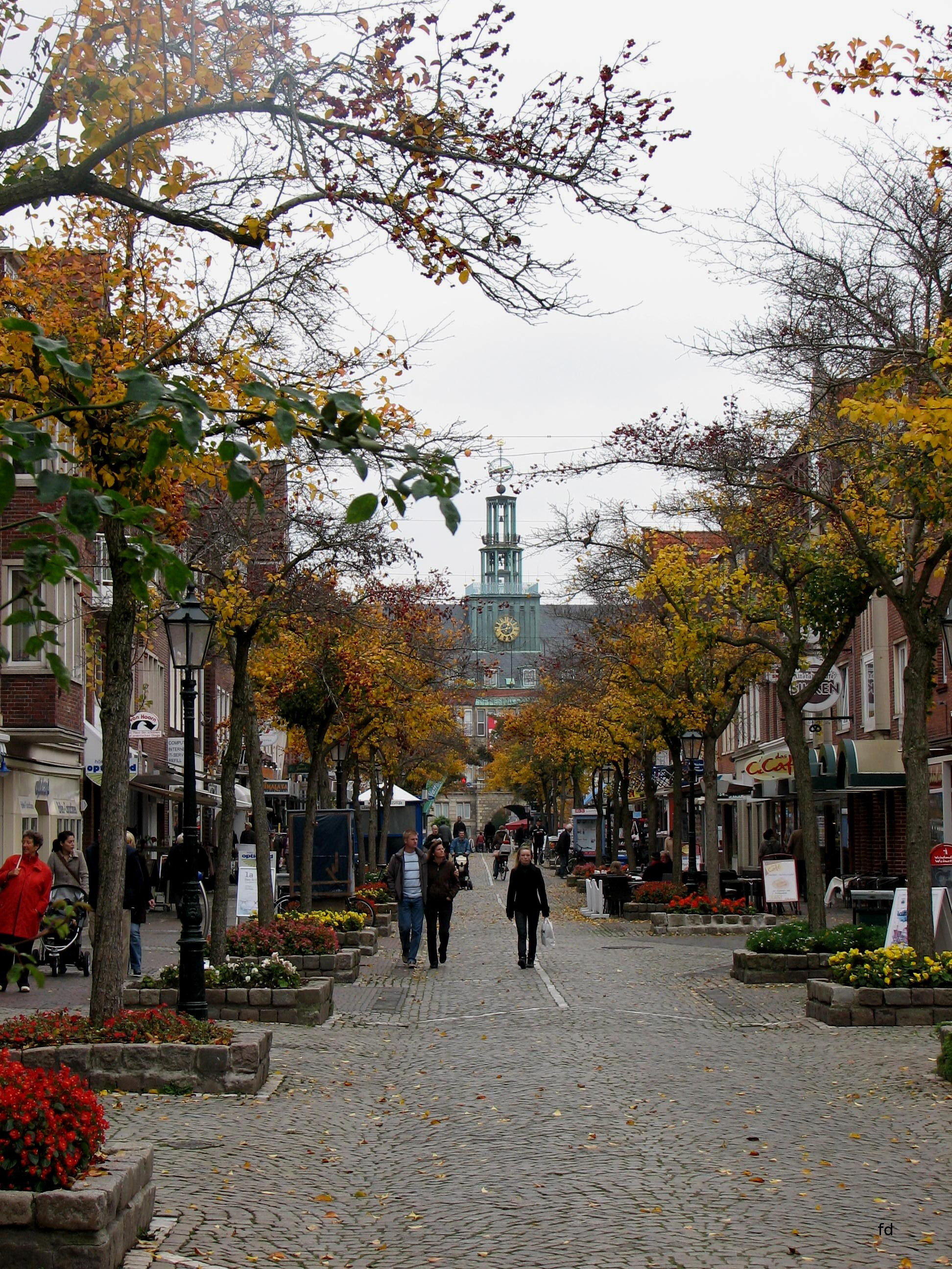 Emden Große Str. Hintergrund Rathaus